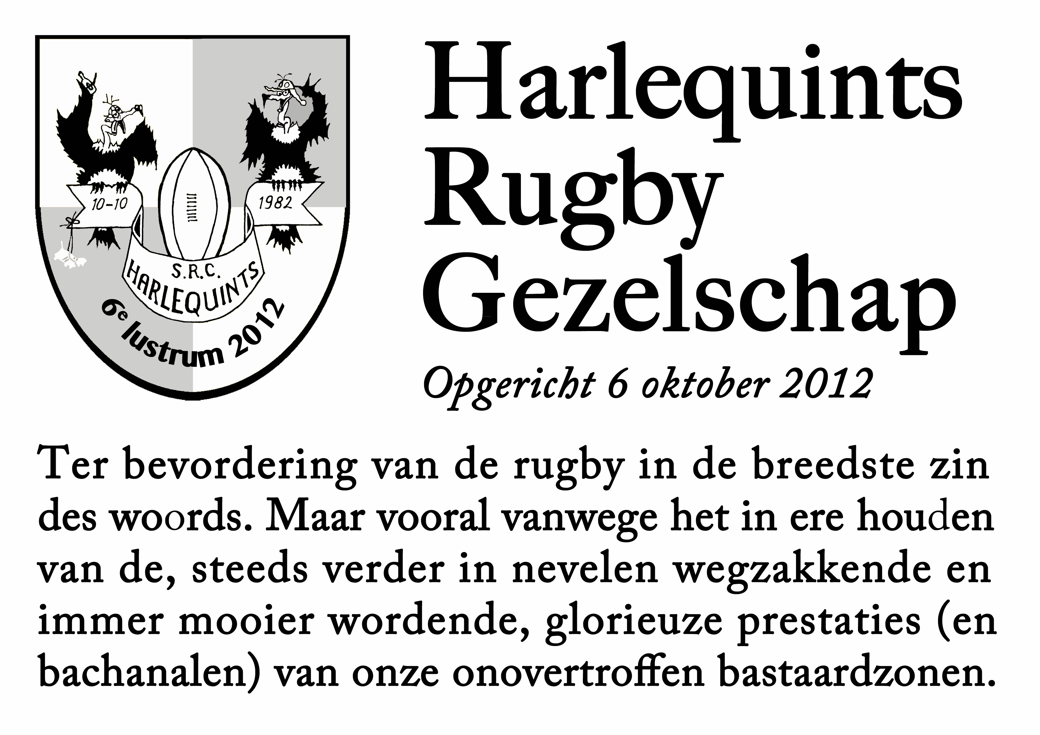 plaquette onthuld ter gelegenheid van de oprichting van het Harlequints Rugby Gezelschap